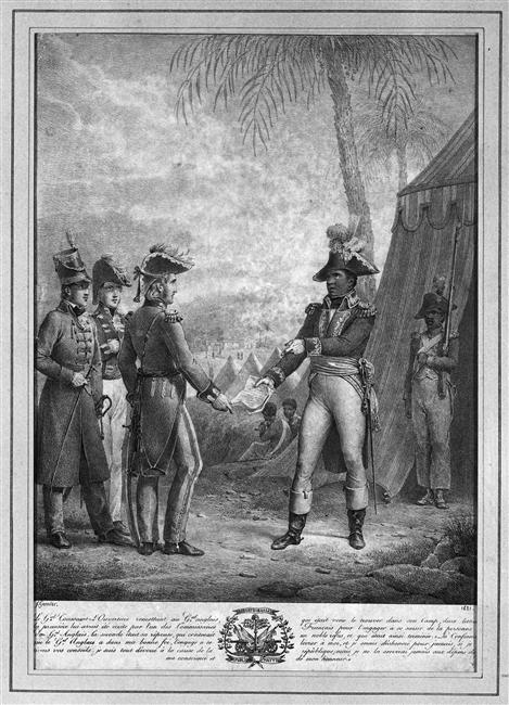 Le général Toussaint Louverture reçevant un général anglais par Grenier de Saint-Martin Francisque (1793-1867), 1821. Source: Paris, musée du quai Branly. Rights: (C) RMN - Droits réservés